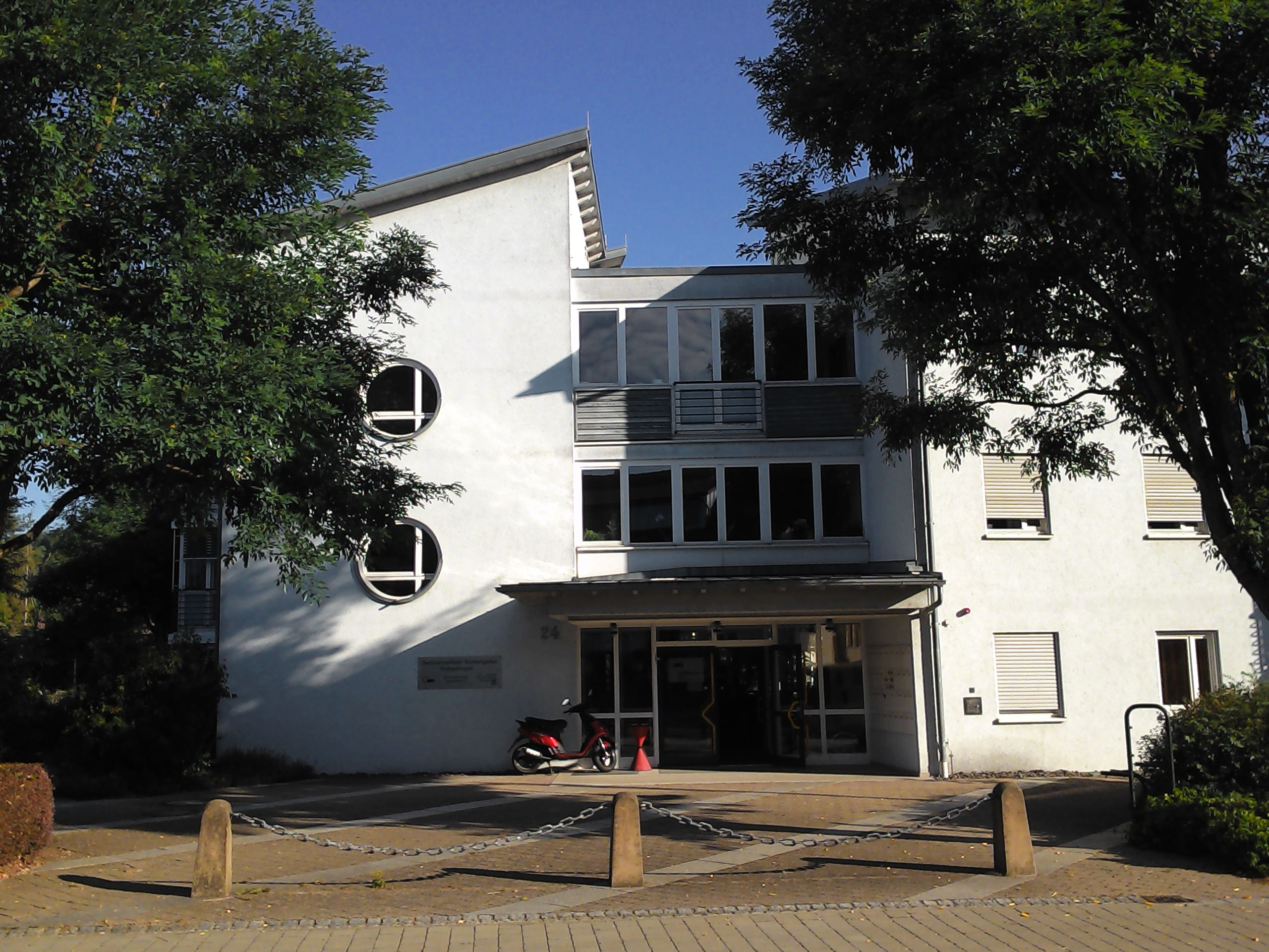 Wutöschingen (Gemeinde), Landkreis Waldshut, Baden-Württemberg. Eingangsbereich der Seniorenwohnanlage.